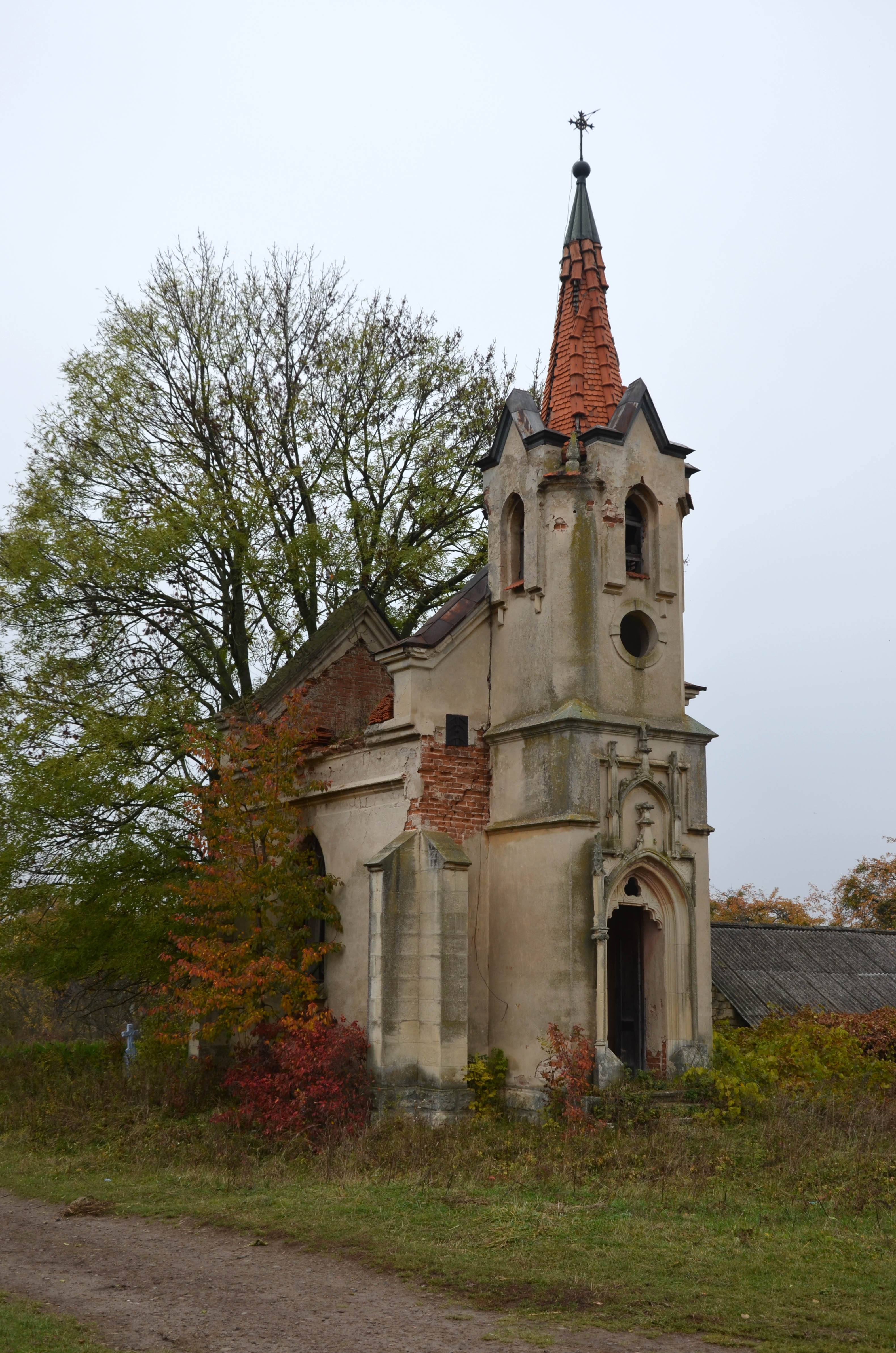 Каплиця-мавзолей у селі Дусанів Перемишлянського району.